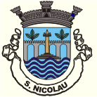 sao nicolau